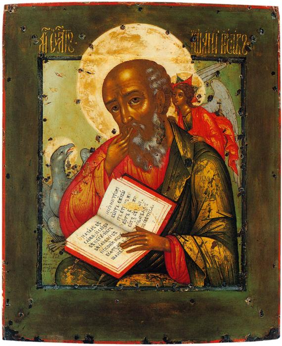 УШАКОВ СИМОН (ПИМЕН) ФЕДОРОВИЧ Иоанн Богослов в молчании. 1673 г. СПМЗ. 33x28 см.